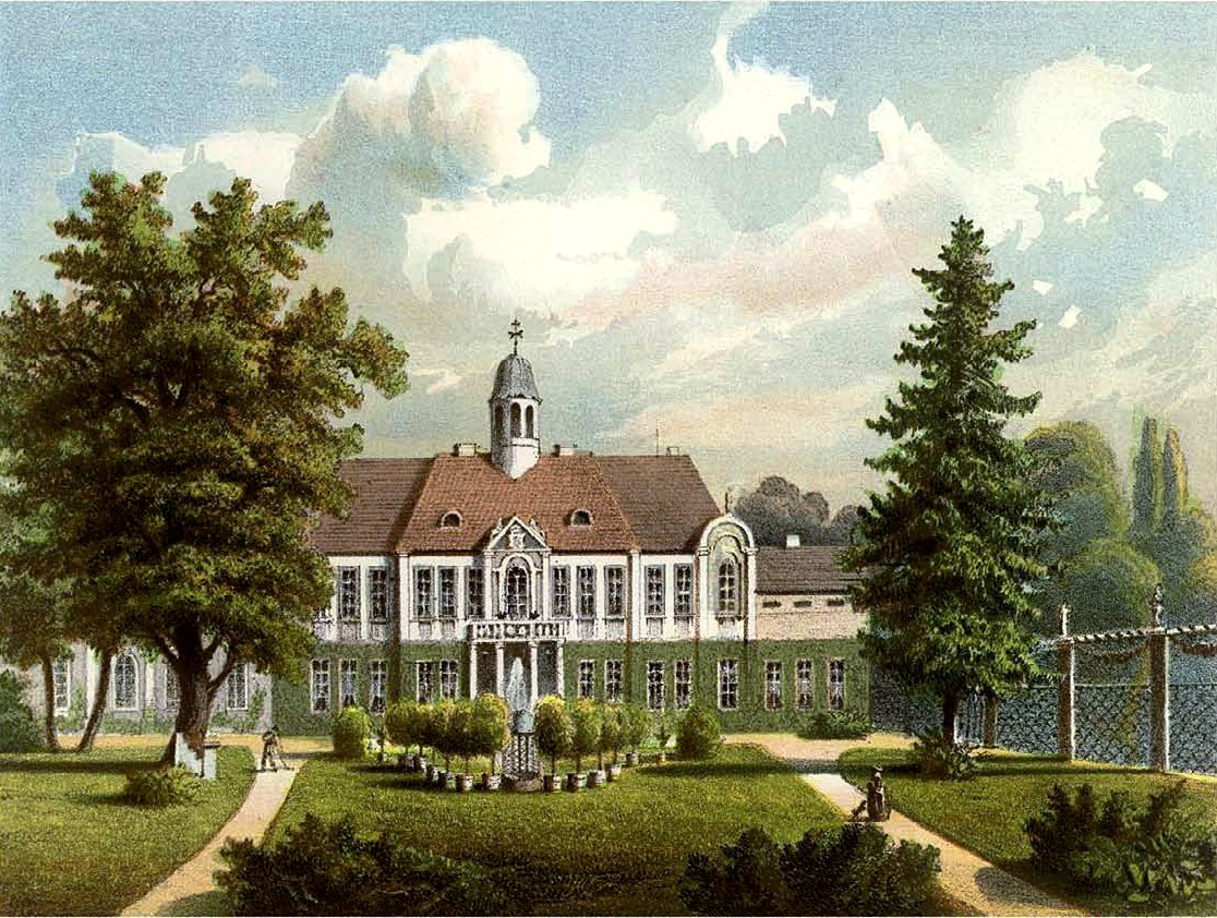 Rittergut Carow